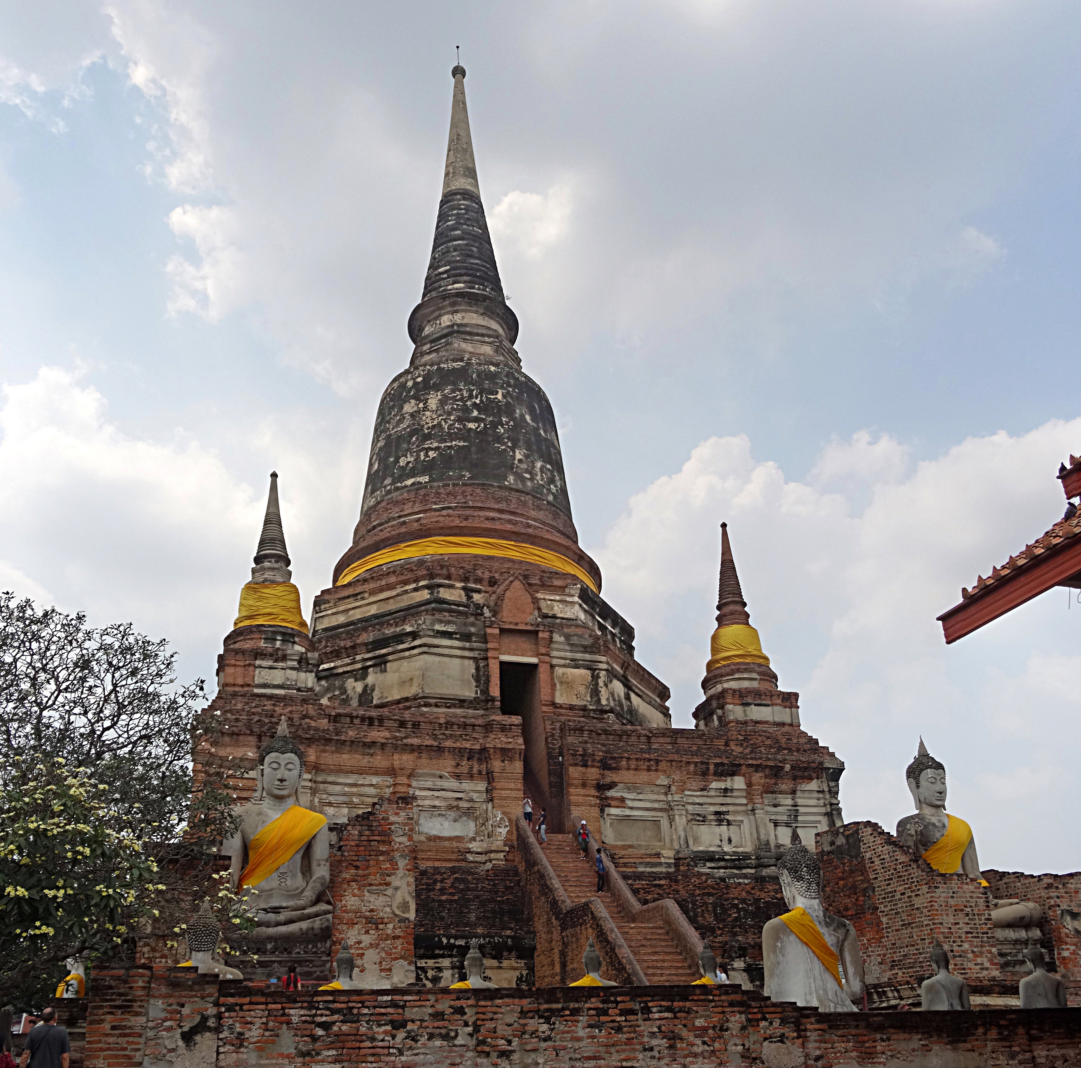 großer Chedi (Reliquienschrein des Buddha) im Wat Yai Chai Mongkhol in Ayutthaya